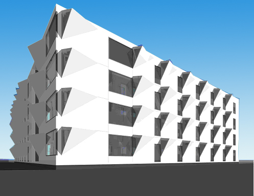 photo hedorfs kollegium